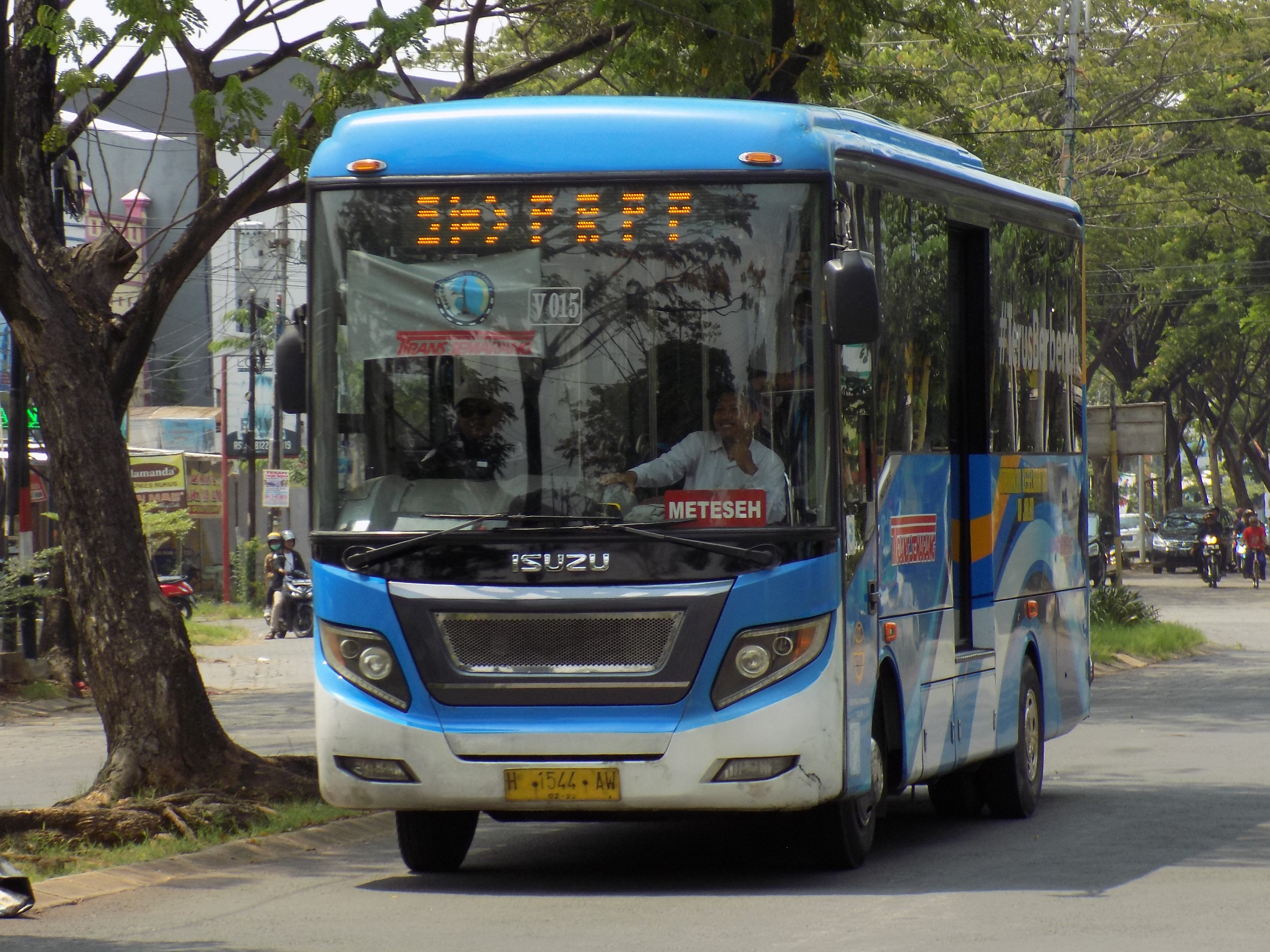 Koridor 5 - Nucleus Trans Semarang Operated by PT Sembilan Sembilan Cahaya